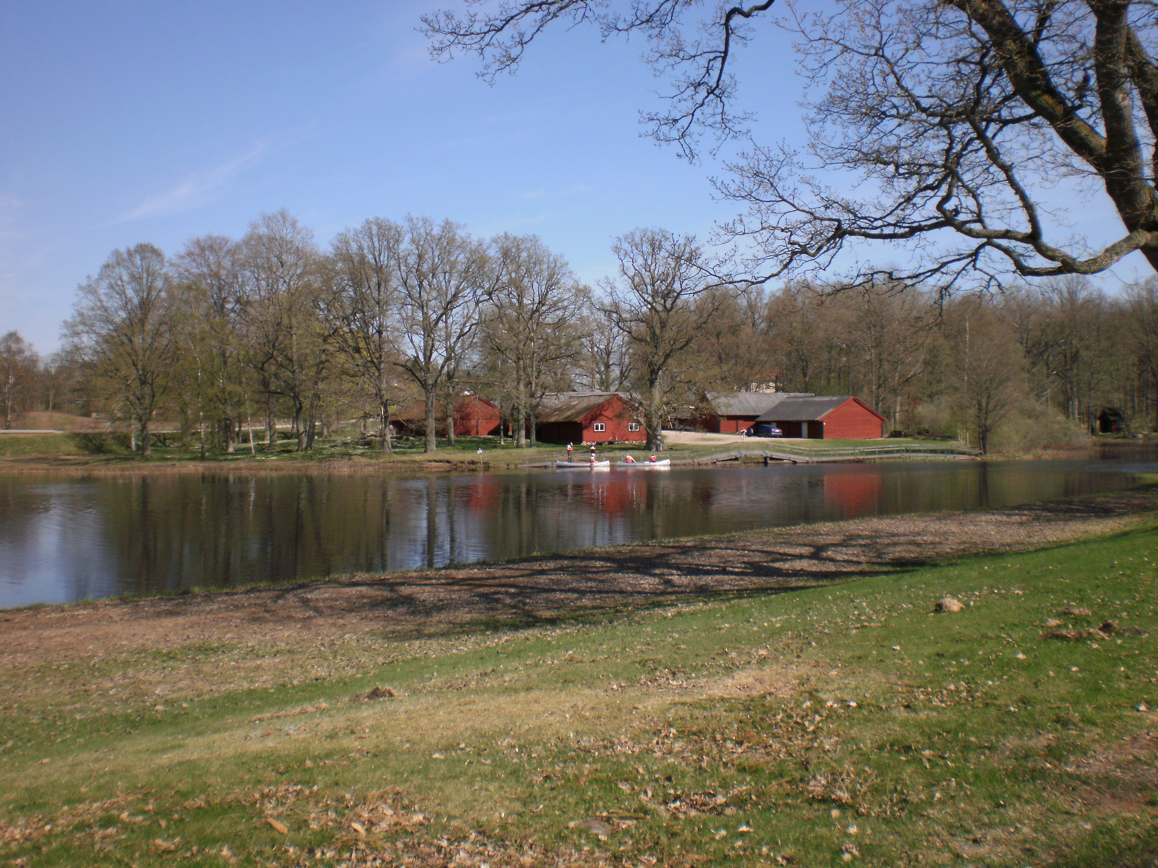 Vissefjärda Kyrkstallar